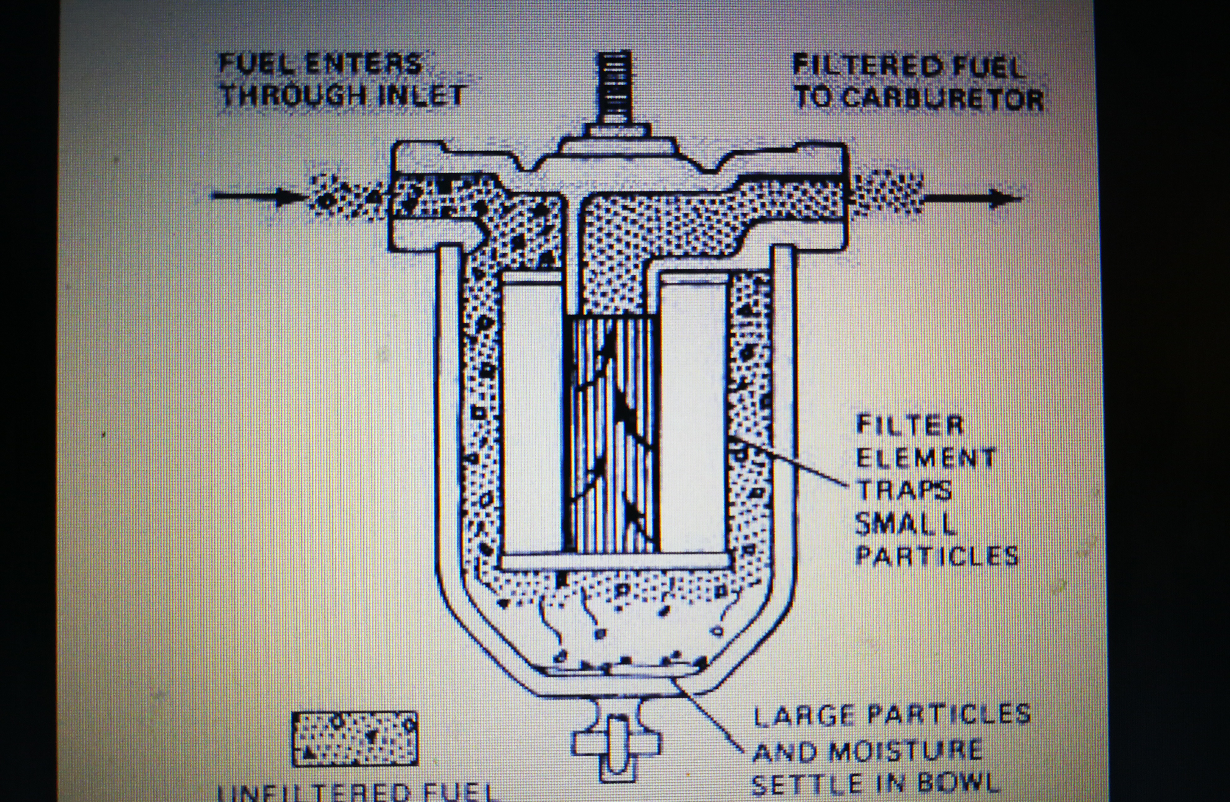 Itt látható hogyan halad végig a gázolaj a szűrőn